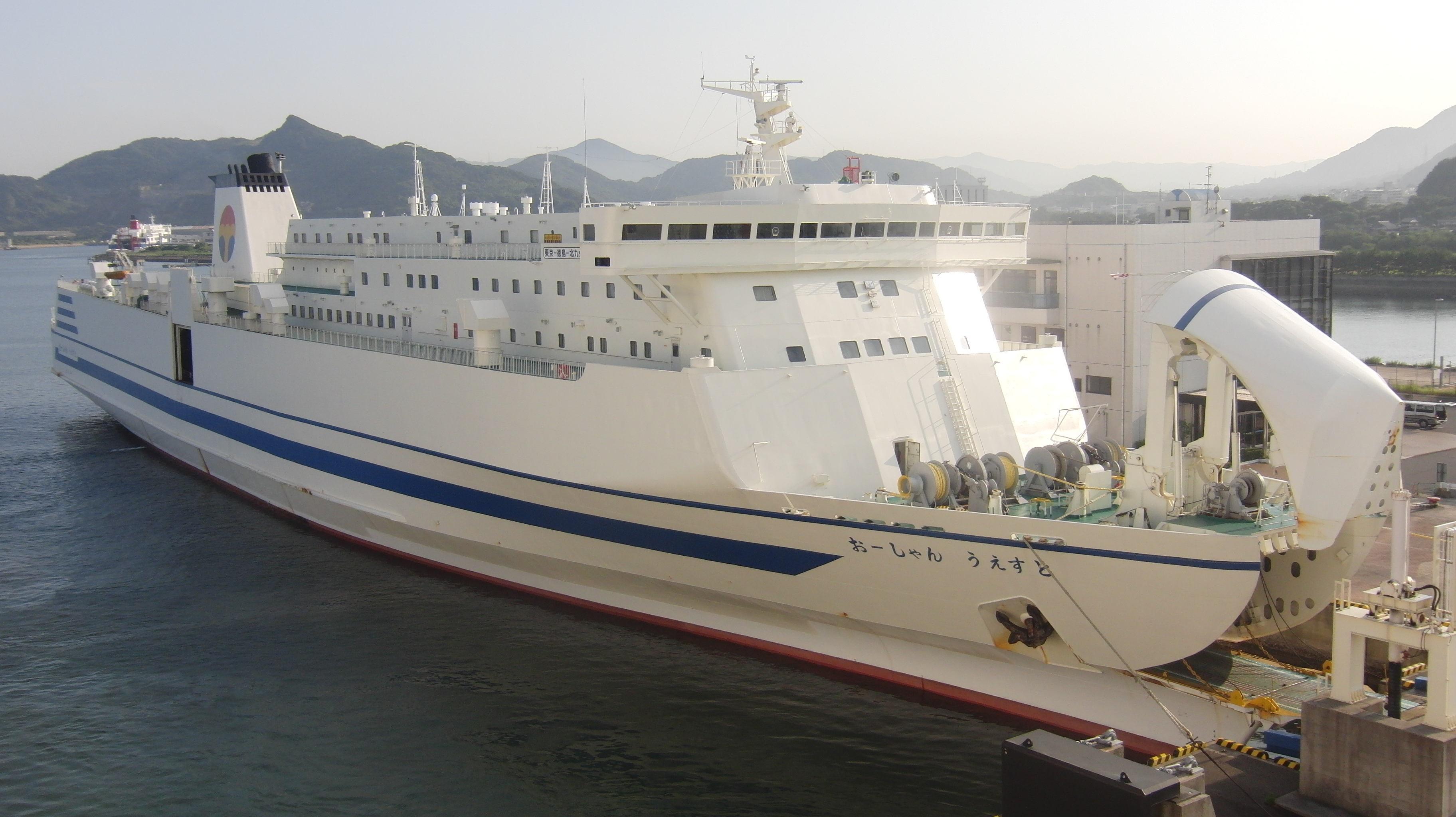 オーシャントランス オーシャン東九フェリー おーしゃんうえすと